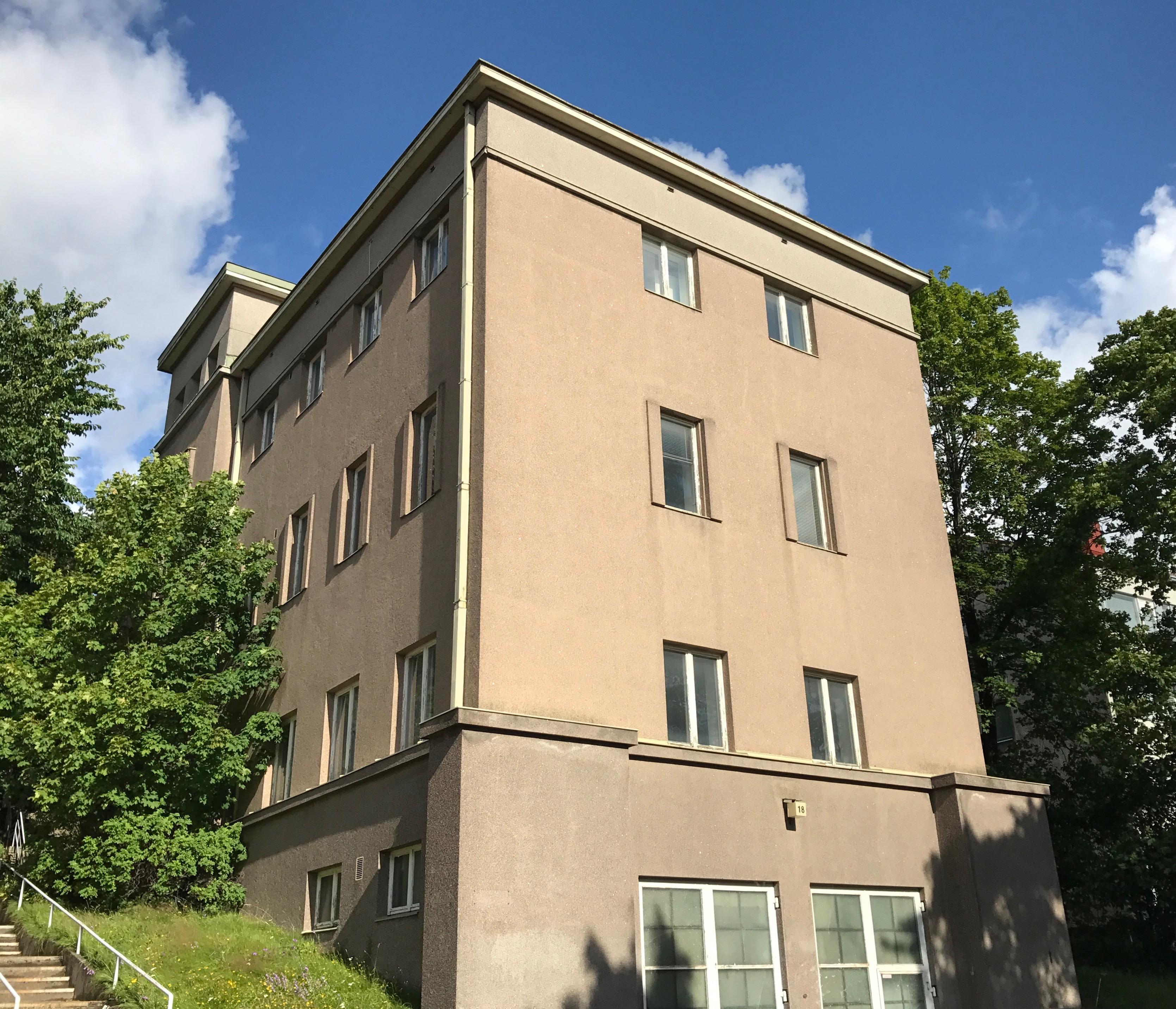 Haagan puhelinkeskus toimi vuonna 1929 valmistuneessa Lars Sonckin suunnittelemassa rakennuksessa. Kauppalantie 18, Haaga.